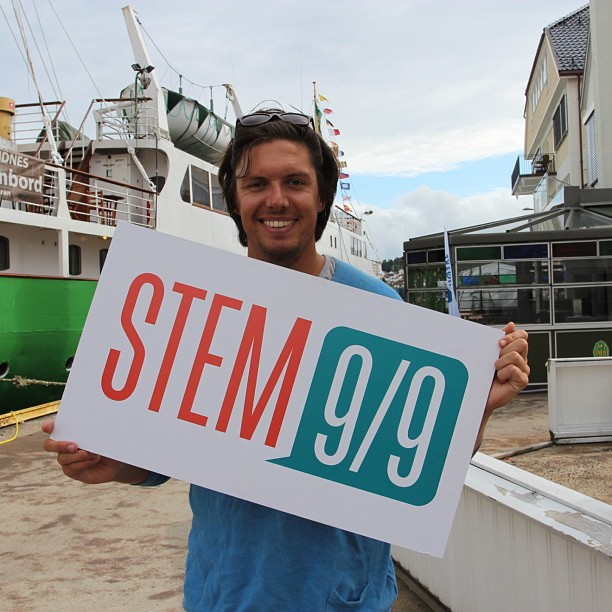 Andreas Wahl er på Sommeråpent 2013 med en oppfordring om å stemme ved Stortingsvalget samme høst.